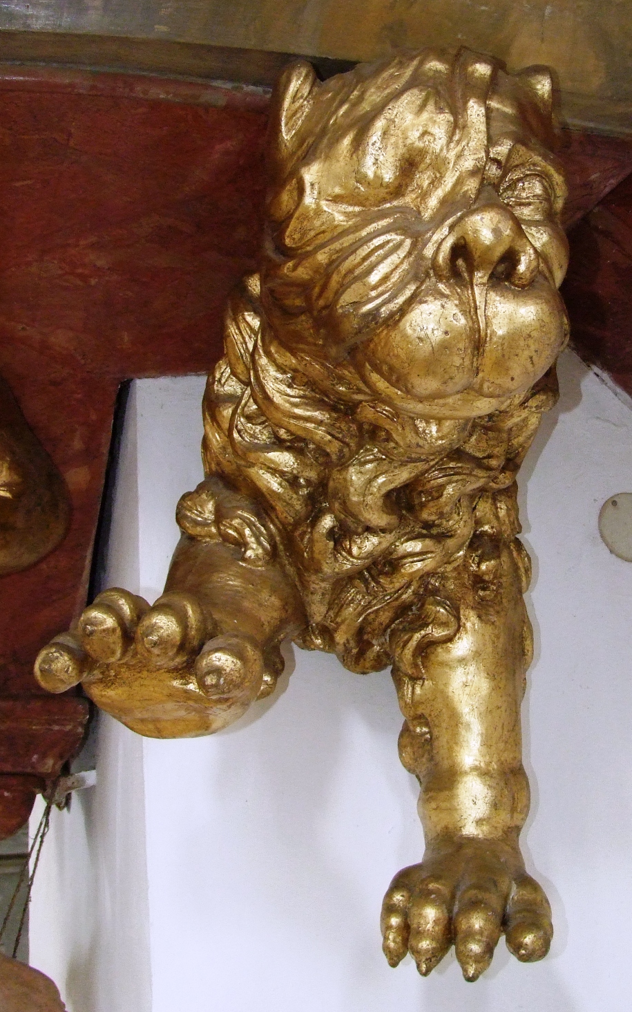 St. Andreas in Babenhausen bei Memmingen Das Attribut Löwe für den Evangelisten Markus, geschaffen von Ignaz Hillebrandt 1721.